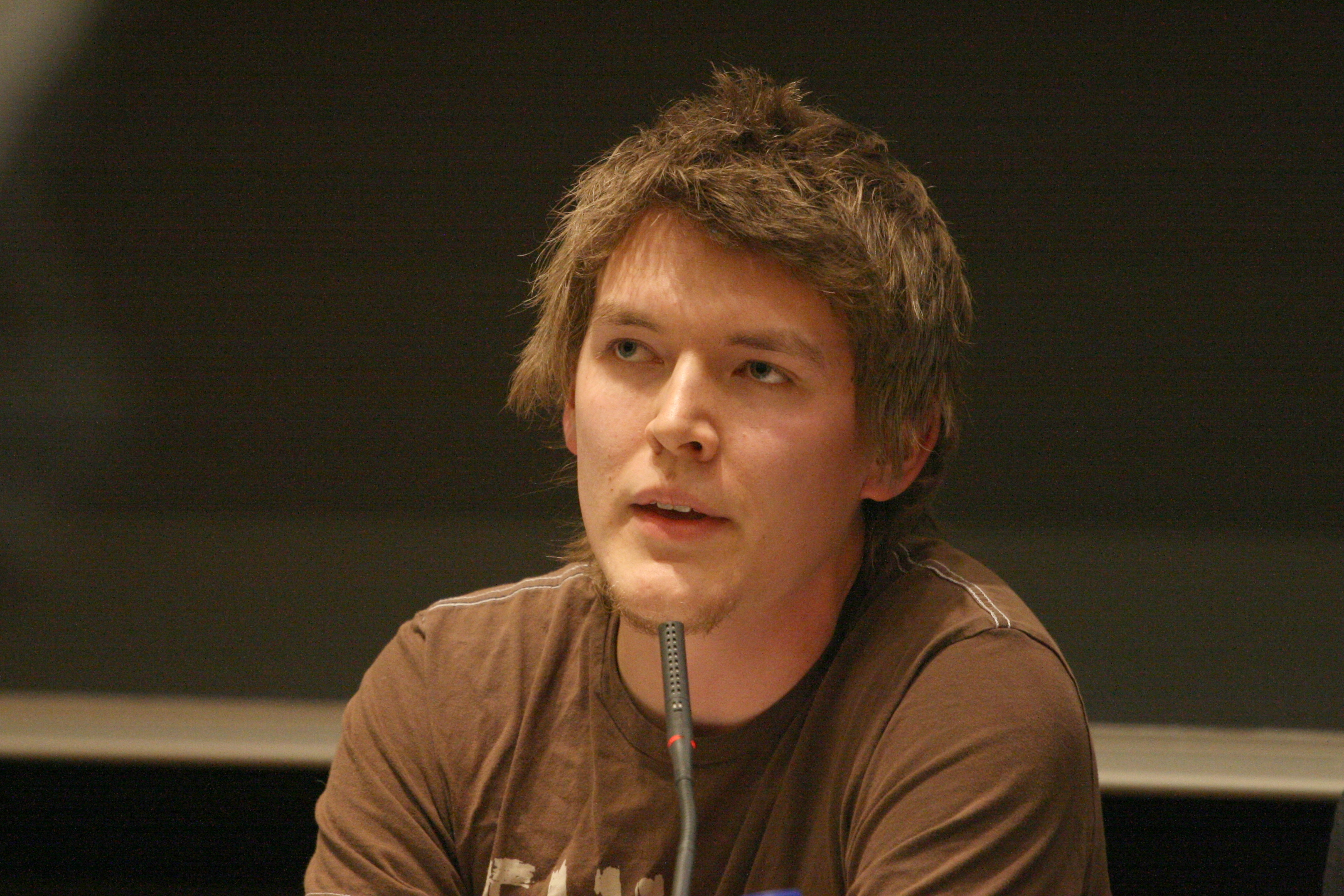 Svenn-Arne Dragly (pressekontakt i Fribit) under en fildelingsdebatt ved Universitetet i Oslo 23. april 2009.